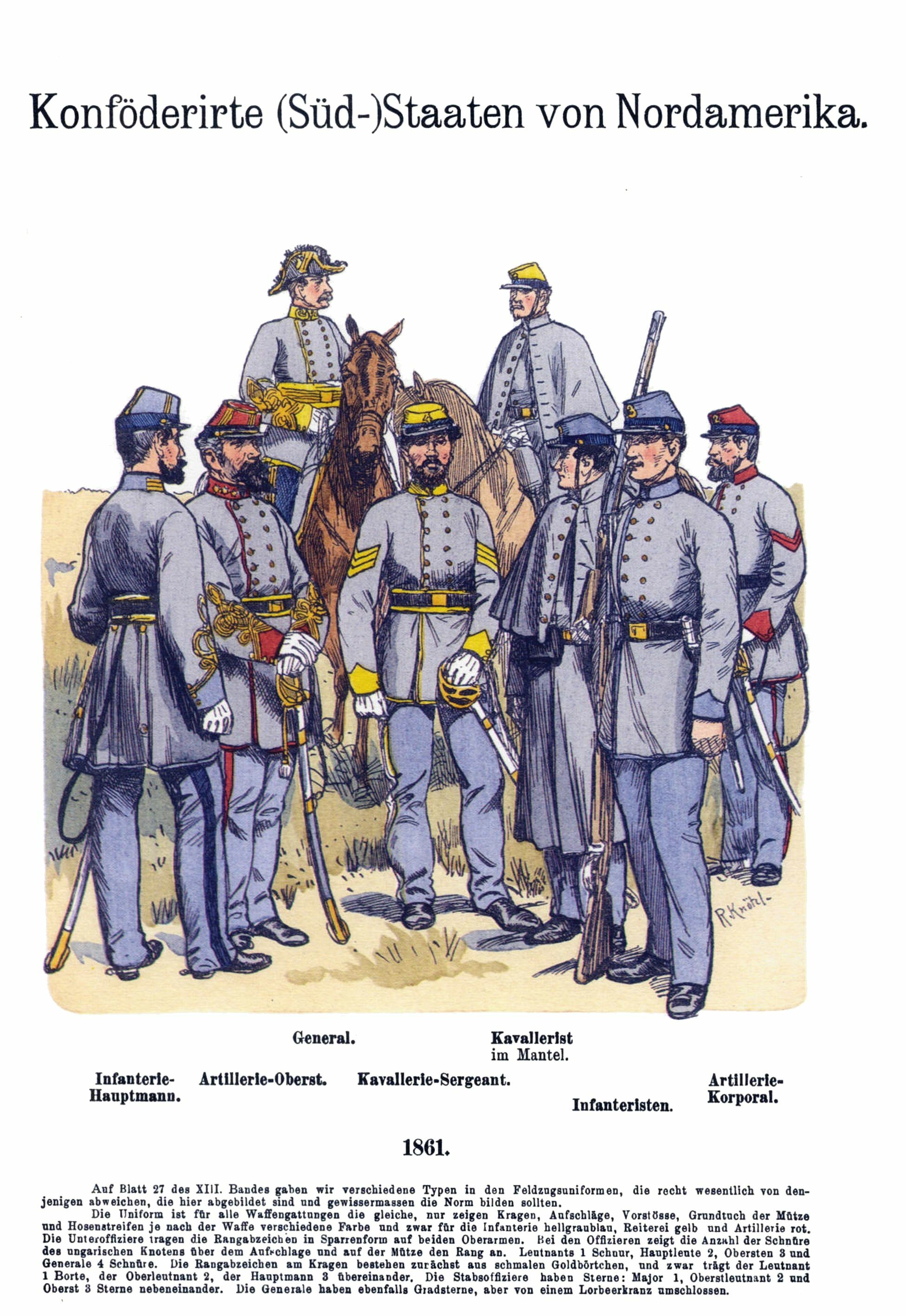 Иллюстрация Рихарда Кнотеля